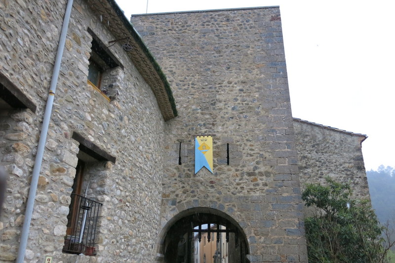 castell de St Llorenç de la Muga_Alt Empordà - Catalunya